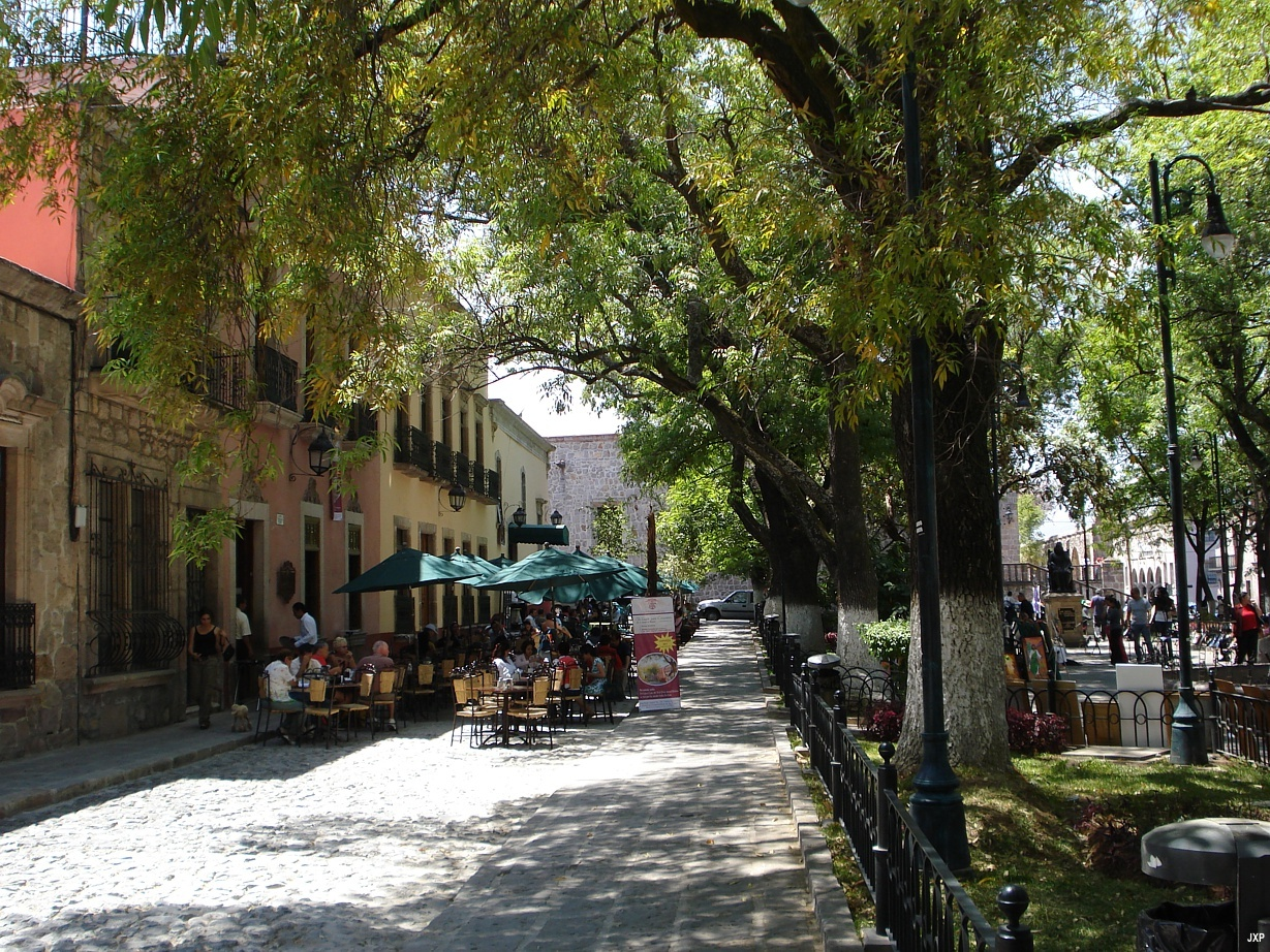 Plazuela o Jardín de las Rosas (vista parcial)